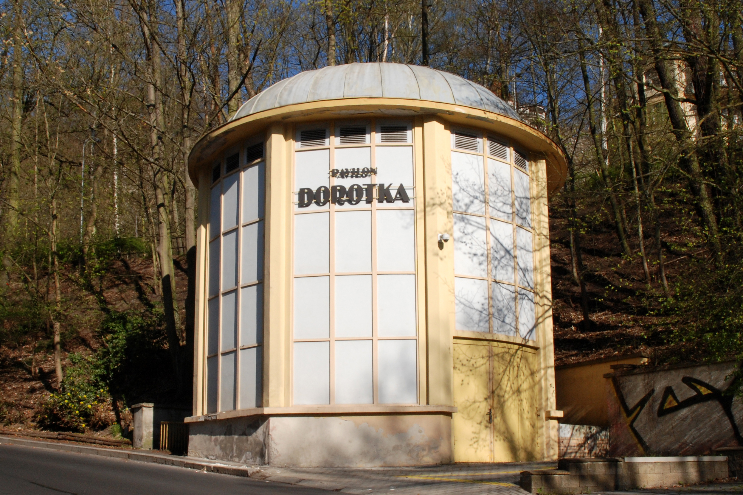 Pavilon pramenu Dorotka v ulici U Imperiálu, Karlovy Vary